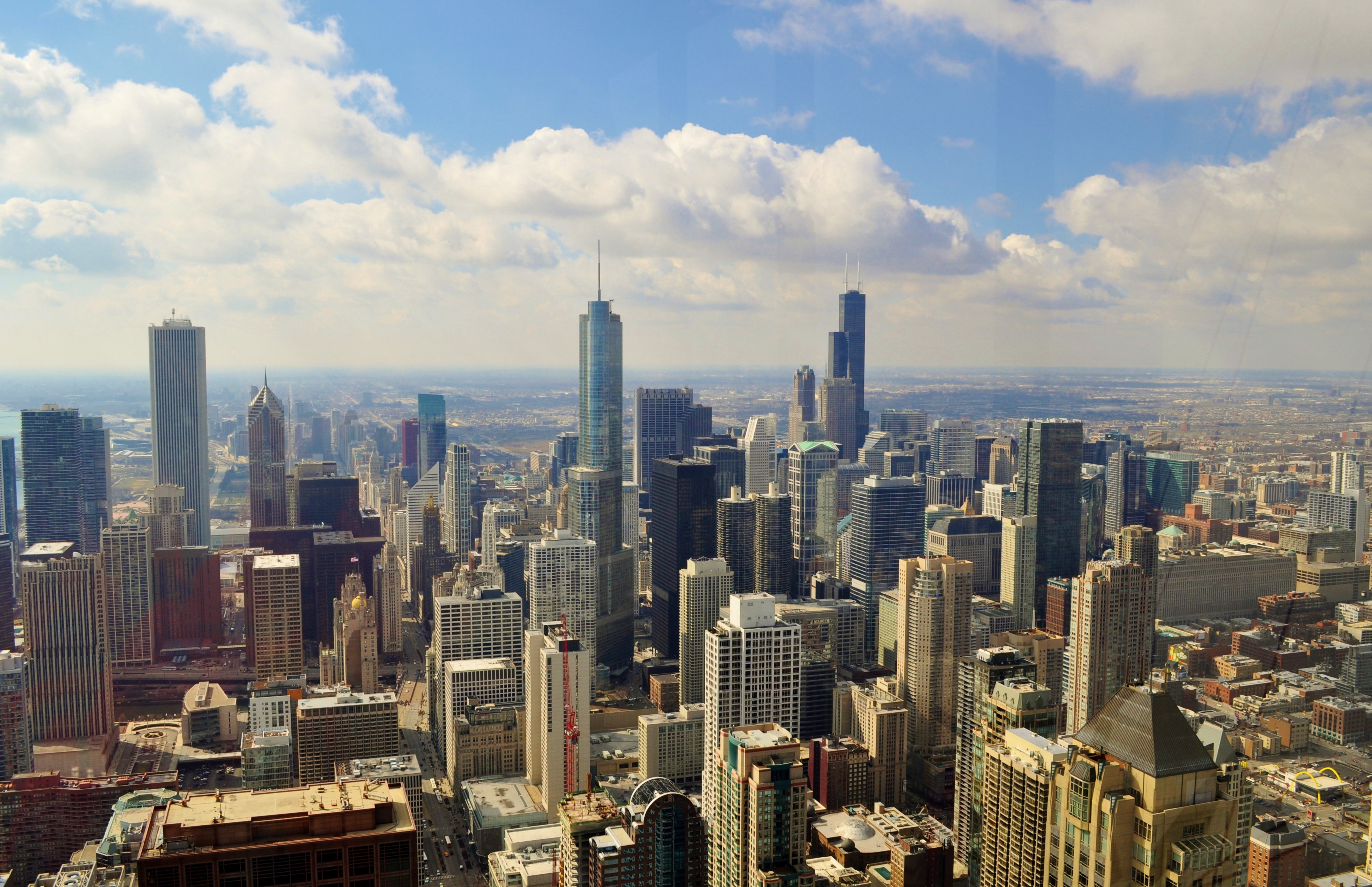 Vista do centro de John Hancock em Chicago